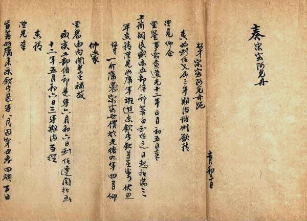 盛京工部侍郎宗室阿克丹奏請陛見摺